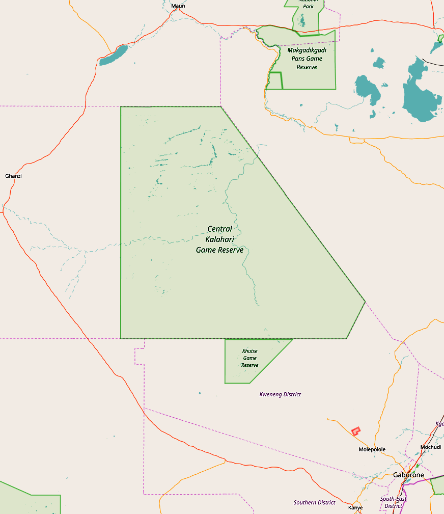 Carte OSM du Central Kalahari Game Reserve